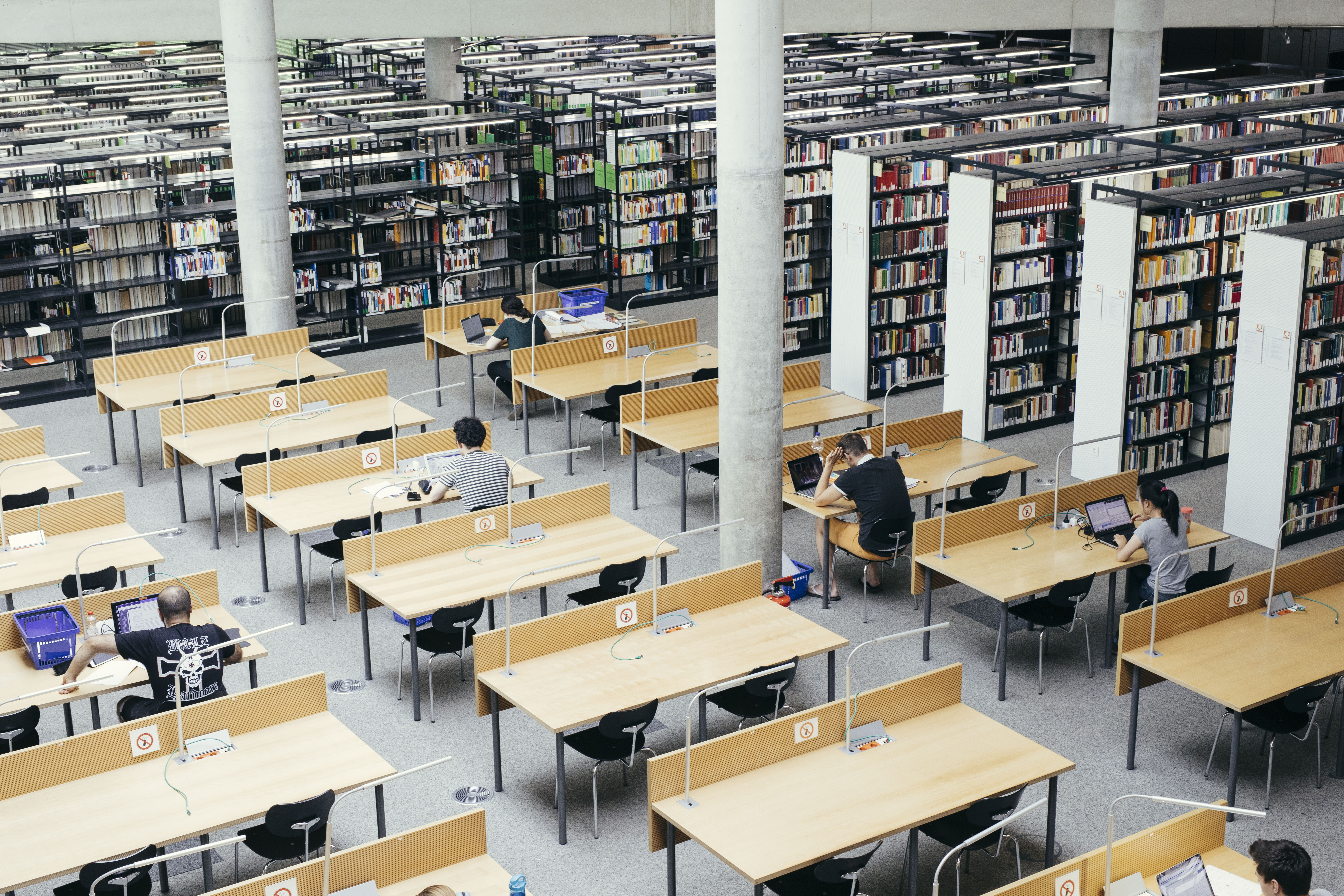 Im 1. Obergeschoss gibt es neben vereinzelten Leseplätzen einen zentralen Lesebereich.